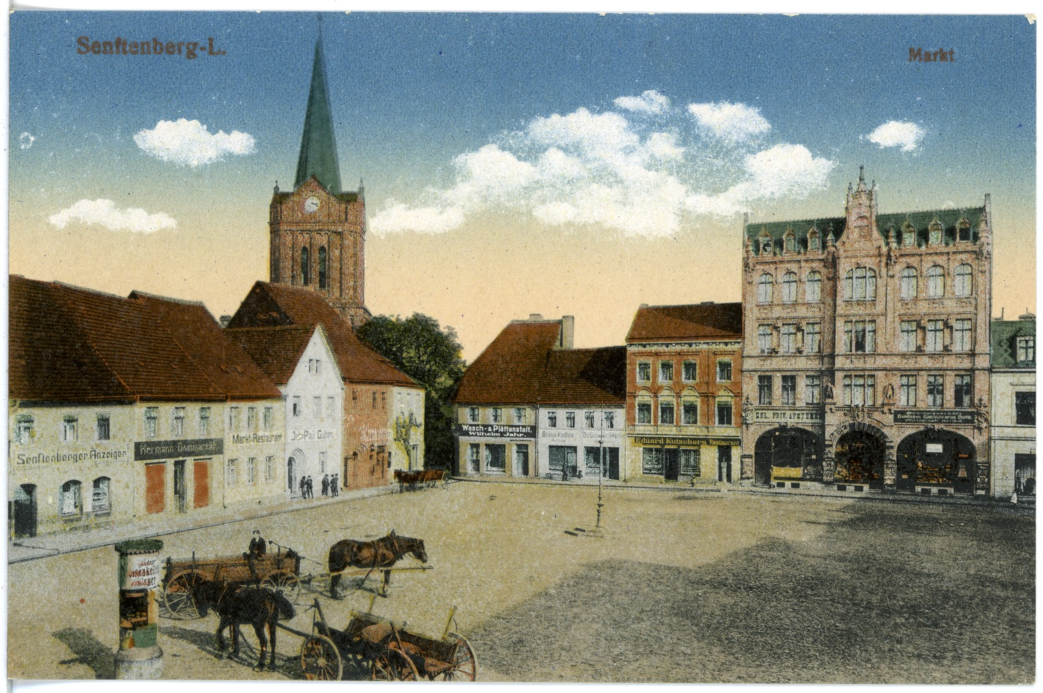 Senftenberg; Markt This postcard is from publisher Brück & Sohn in Meißen ( postcard has a unique number 20432 and is available in a higher resolution at the publisher. This images was uploaded in a cooperation project between Wikipedians and the publisher.